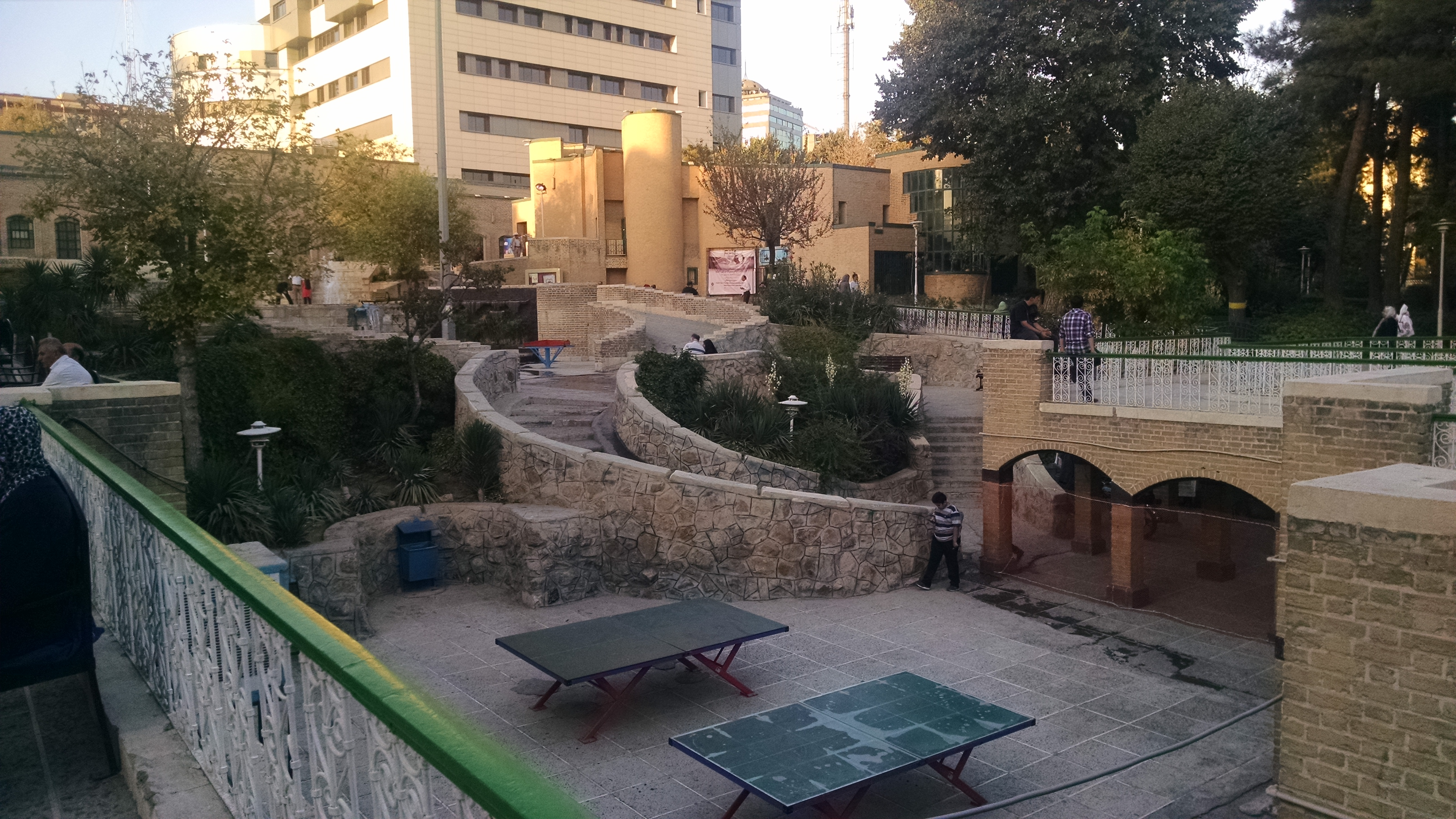 پارک شفق